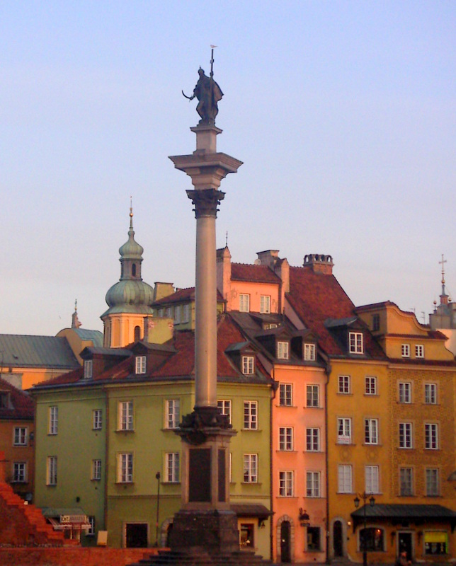 Kolumna Zygmunta